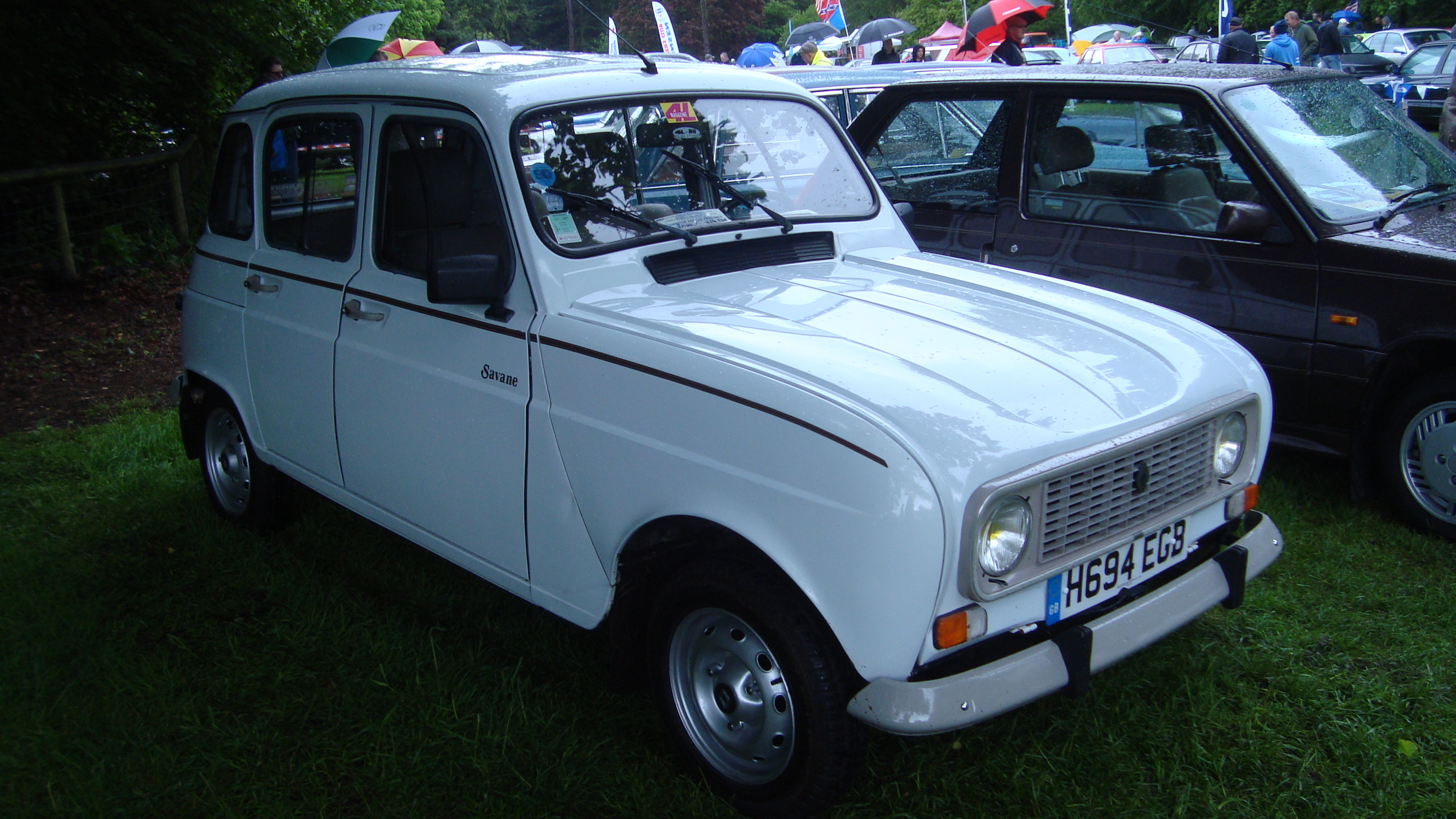 1990 Renault 4 1.0 Savane